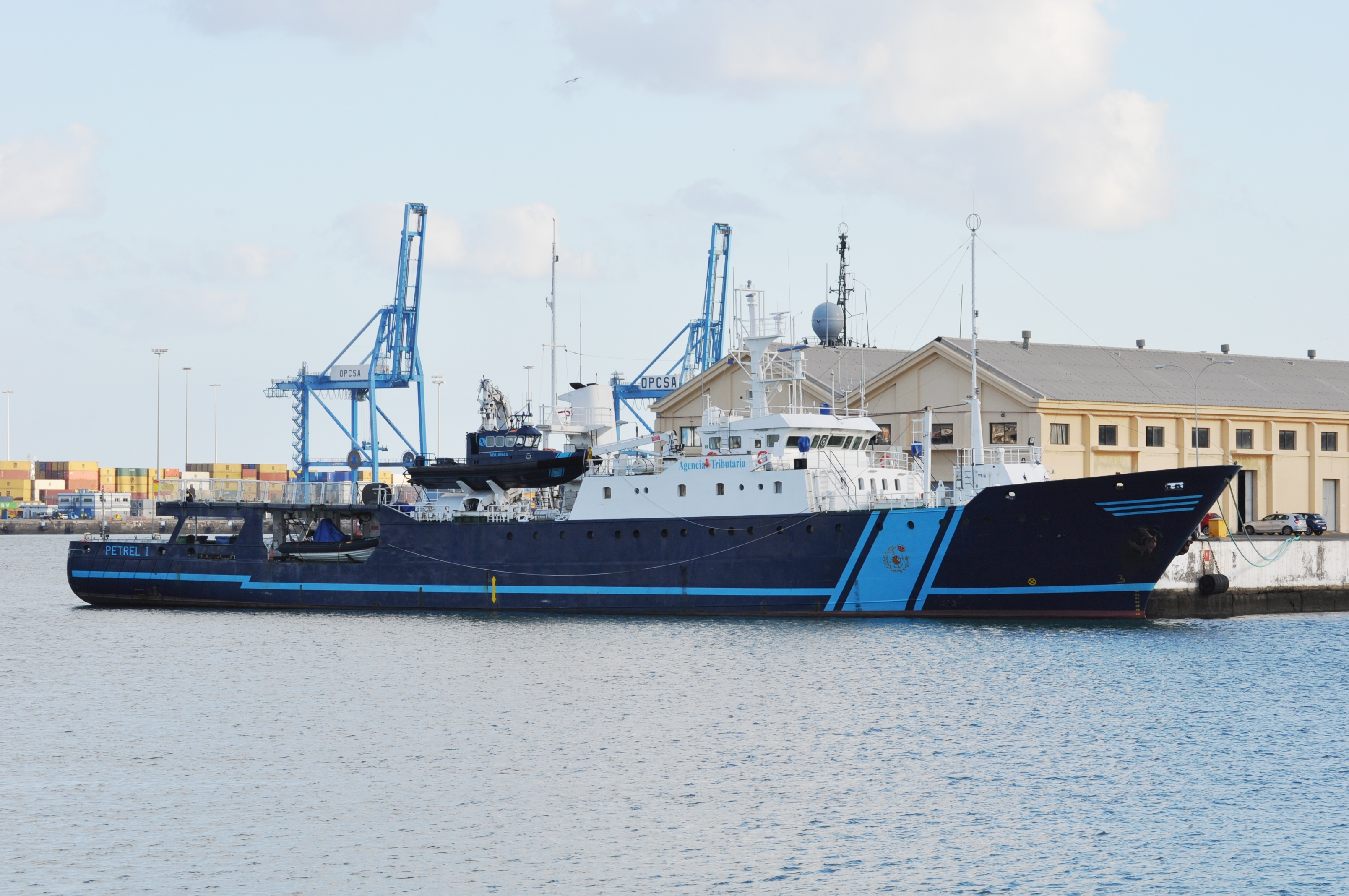 Buque del Servicio de Vigilancia Aduanera (SVA) "Petrel I", considerado su buque insignia.